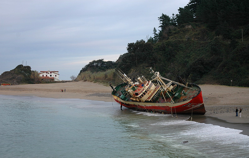 Michel Falmouth arraste ontzia, Saturraranen (Mutriku). Haizeteak eta itsaso zakarrak ekarri zuten Ondarroako portutik. Ezkerraldean, Saturraran Zahar baserria ageri da.